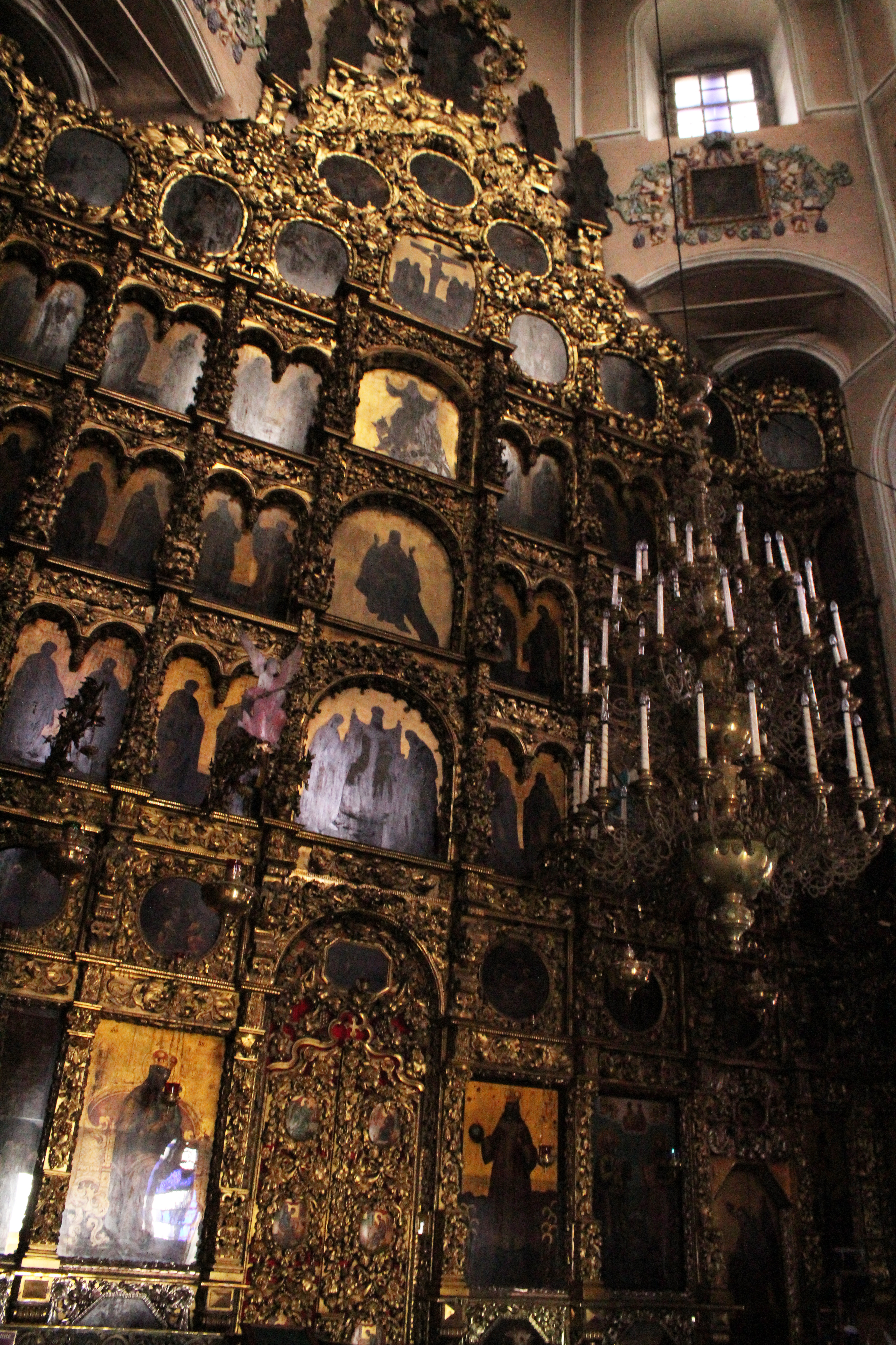 Собор: улица Мусы Джалиля, 21, Казань, Татарстан